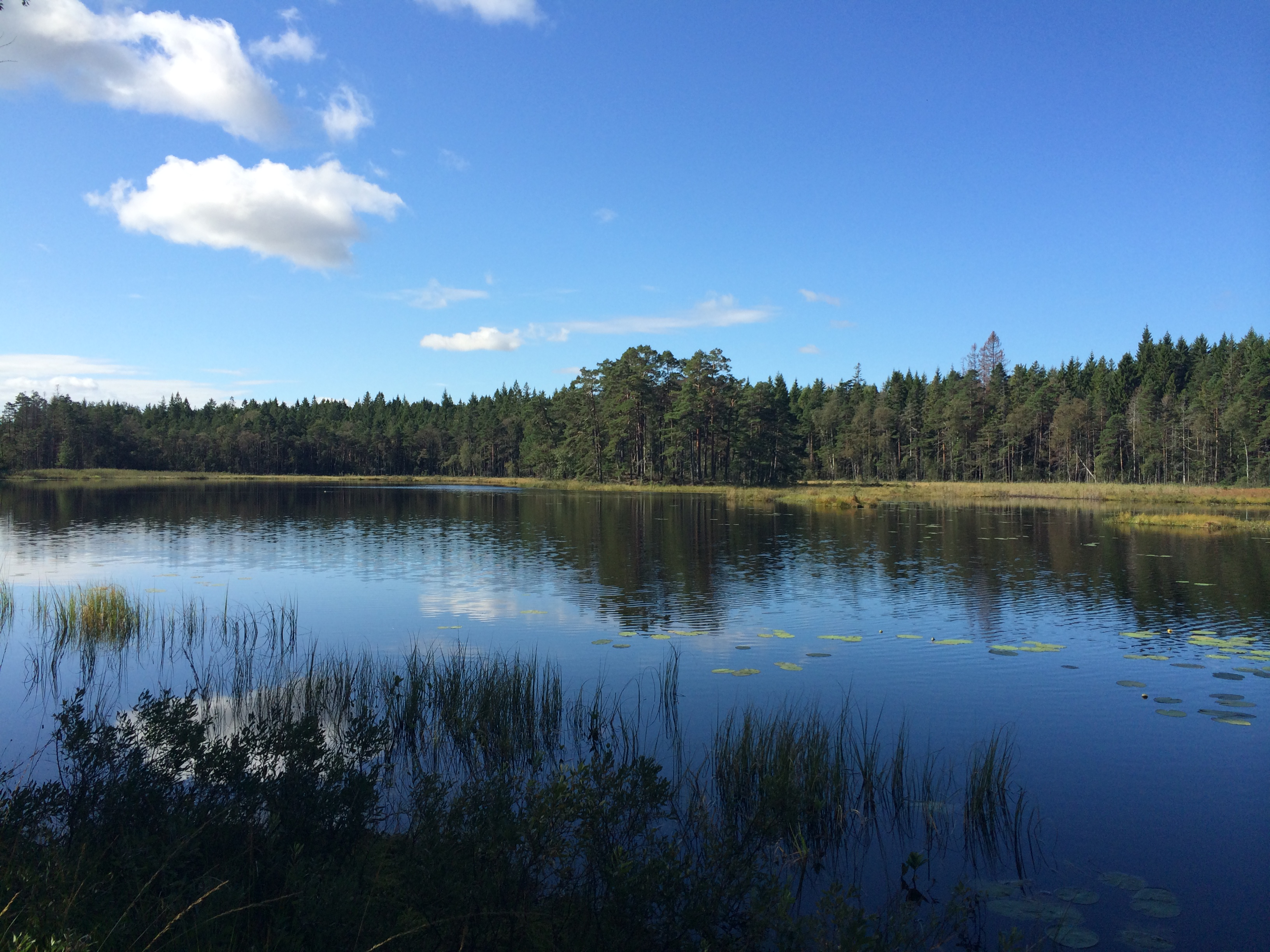 Ekelunds Gransjö, Hunneberg